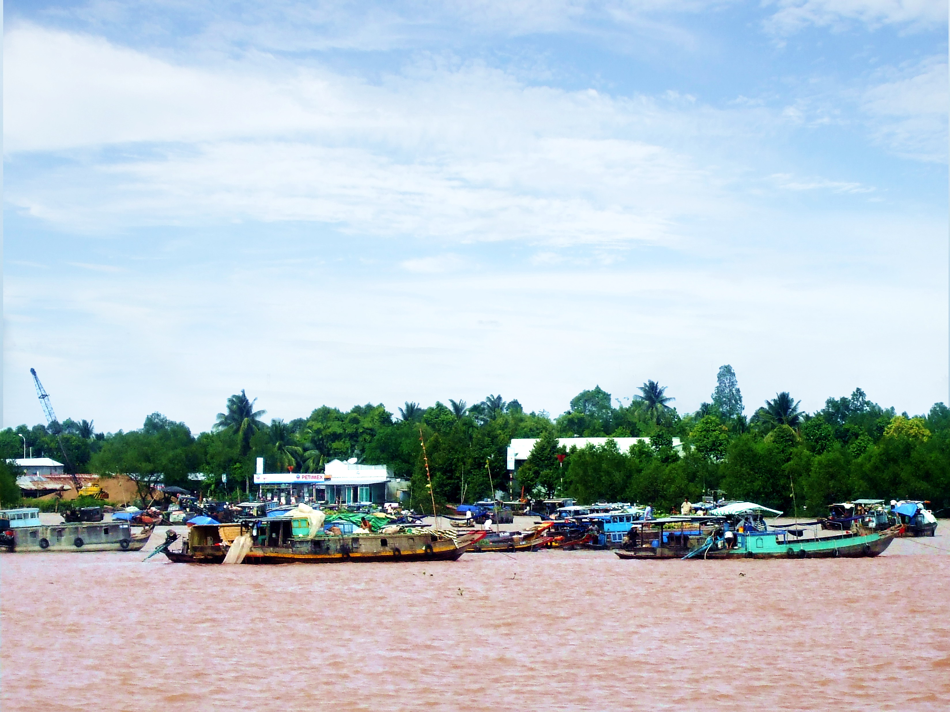 Mua bán bằng xuồng ghe trên sông (được gọi chợ nổi) ở Trà Ôn, Vĩnh Long, Việt Nam.